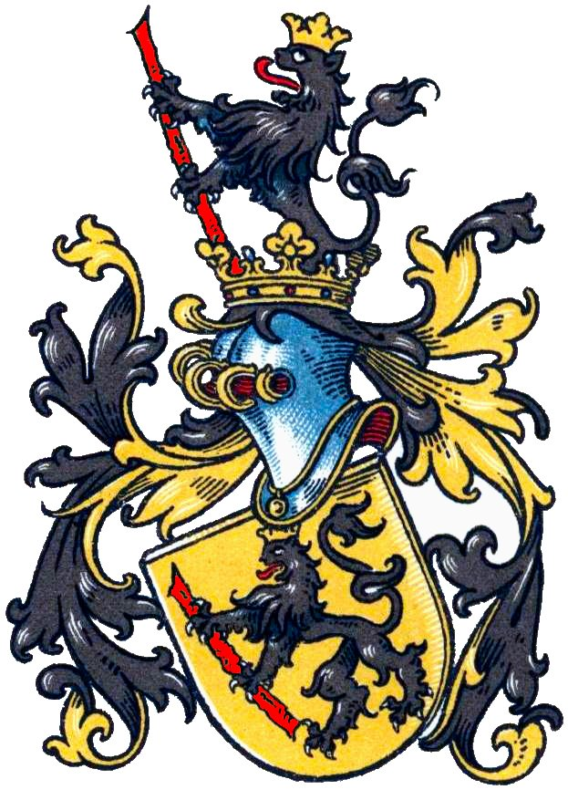 Wappen des deutschen Adelsgeschlechtes Milkau, Tafel 219_3 aus dem Wappenbuch des Westfälischen Adels (Buch 2)